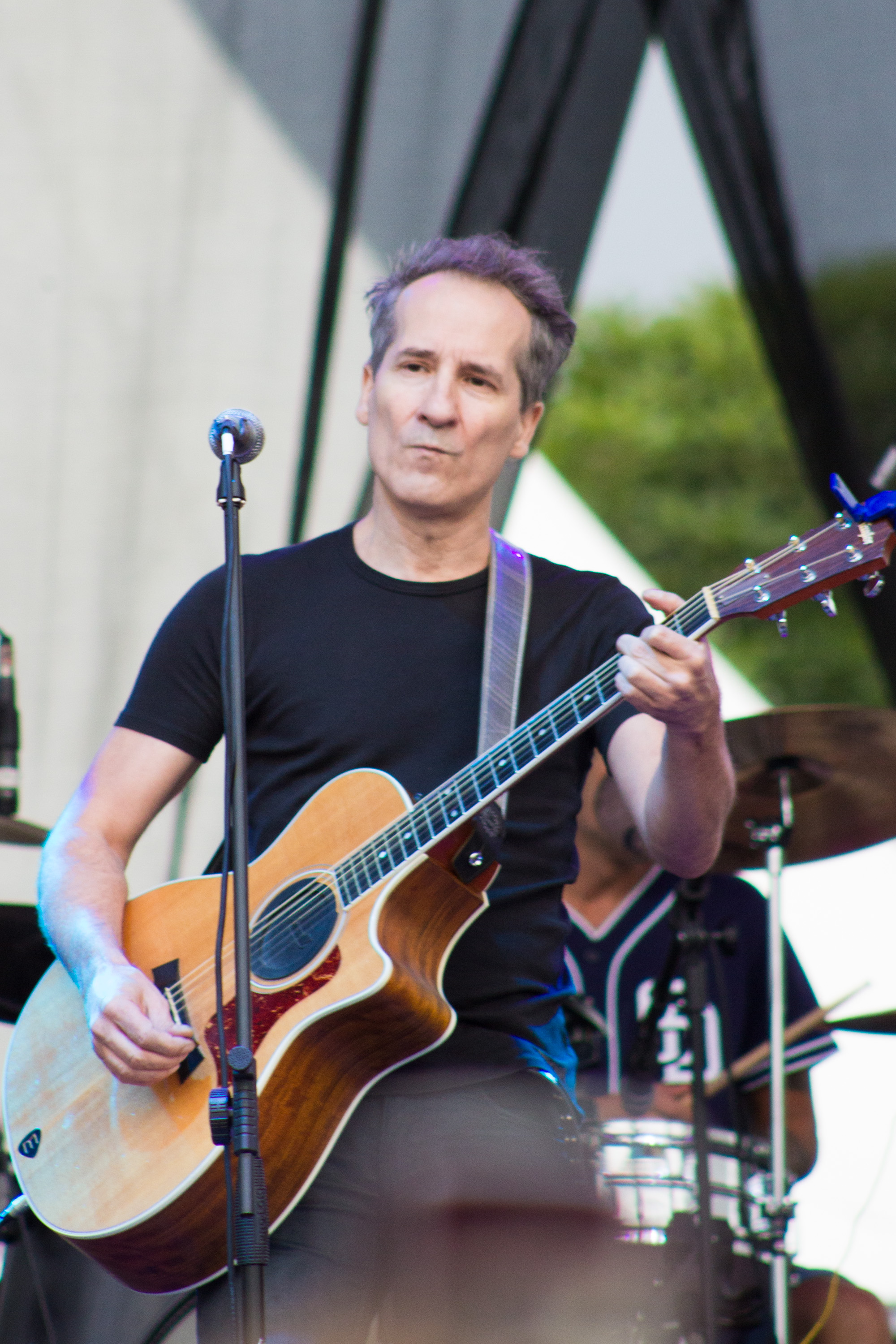 [2014-11-23] Festival Sabor de São Paulo_22_Romerito Pontes